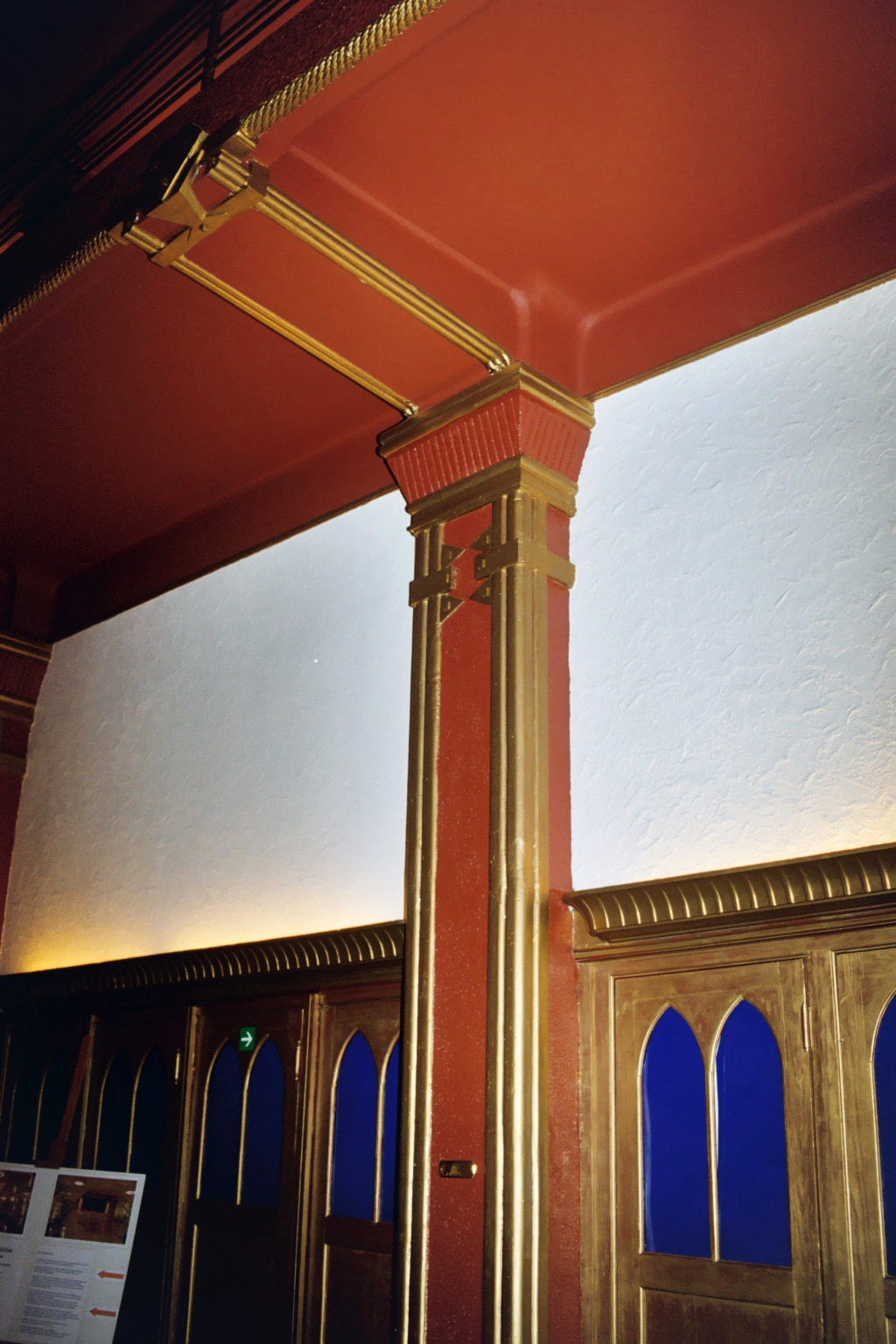 Belgique - Bruxelles - Complexe Albert Hall - Roseland